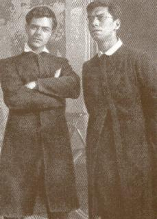 Photo du poète Afonso Lopes Vieira et de son ami Alberto Cosa en 1899 à Coimbra